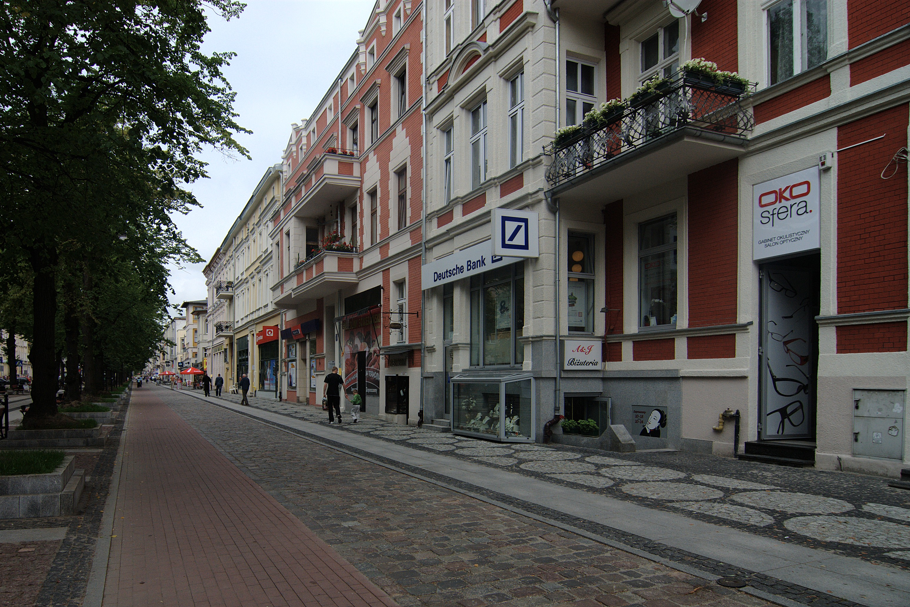 Słupsk. Aleja Wojska Polskiego.